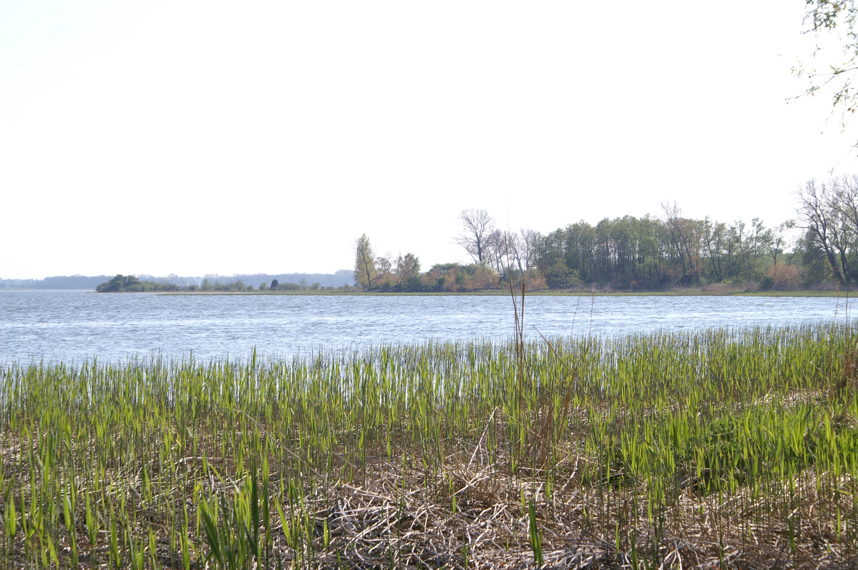 Möwenort, Südspitze des Gnitzes auf Usedom, von Nordosten gesehen